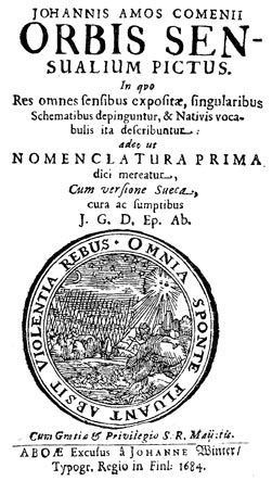 Sida ur Johan Amos Comenius' Orbis pictus.